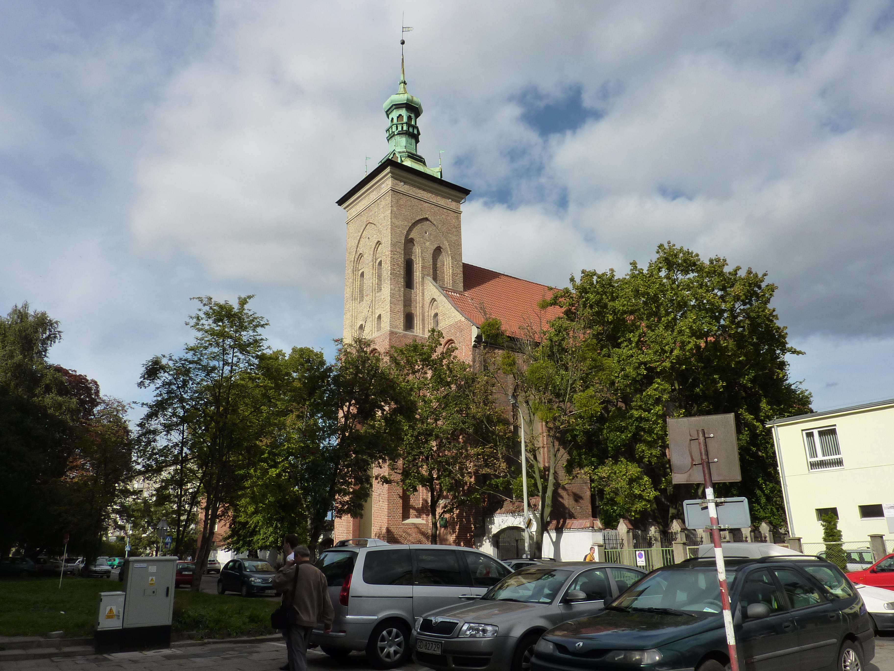 Widok na kościół św. Jakuba od strony ul. Gnilnej